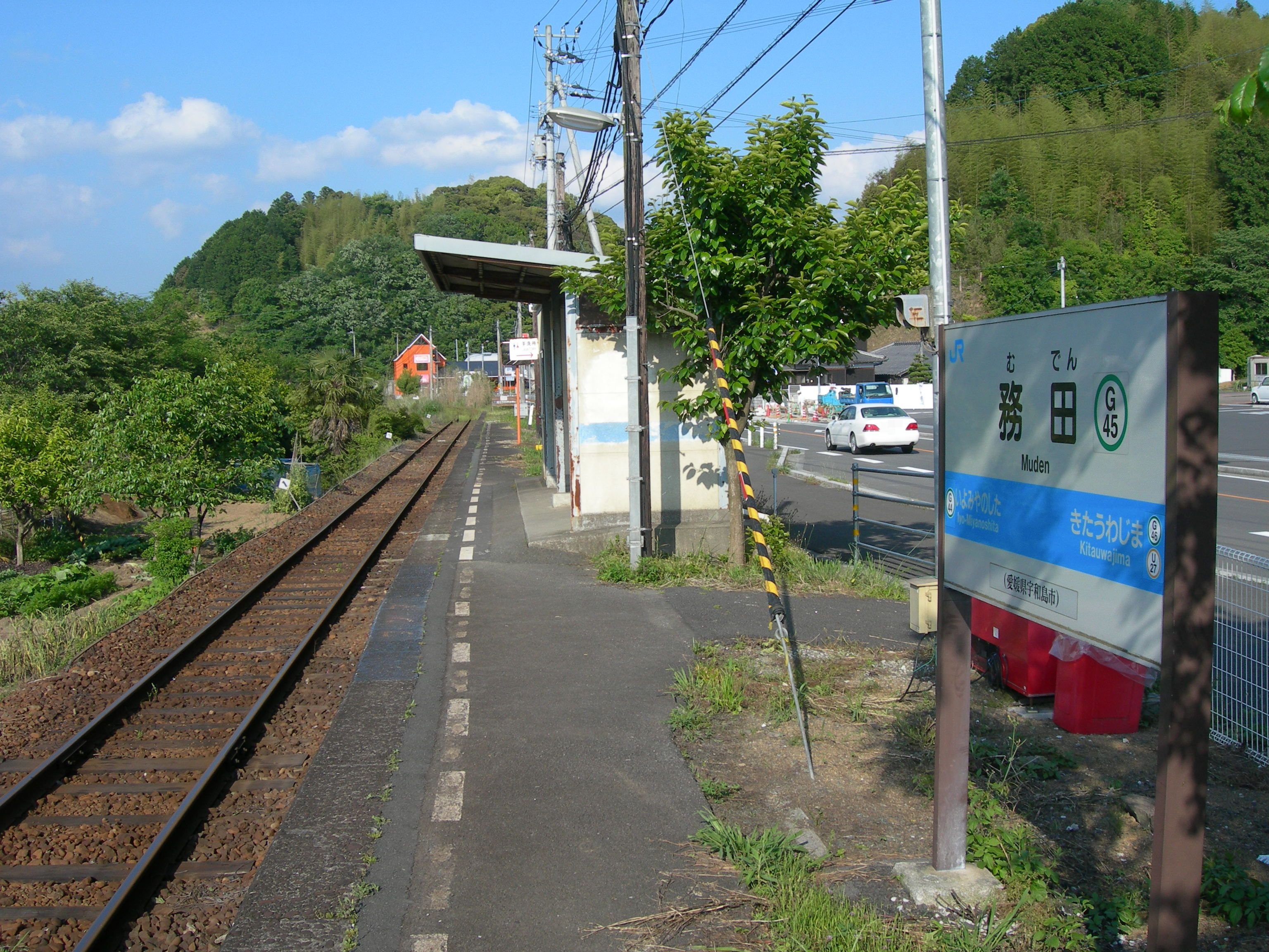 務田駅ホーム